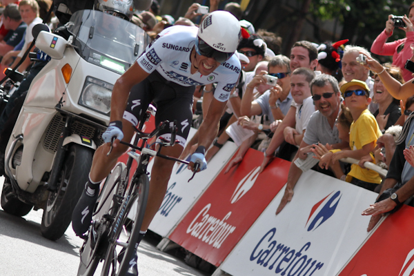 Alberto Contador